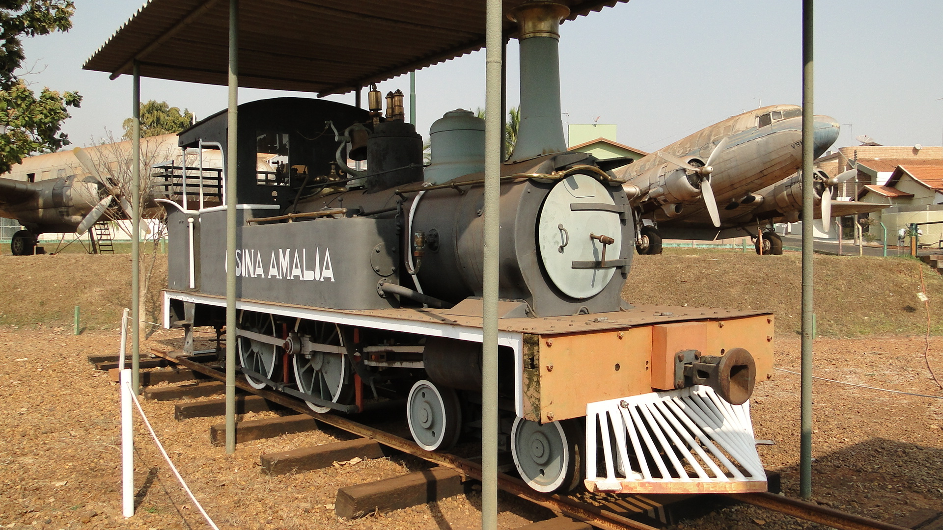 museu de bebedouro 06-09-2010 15-18